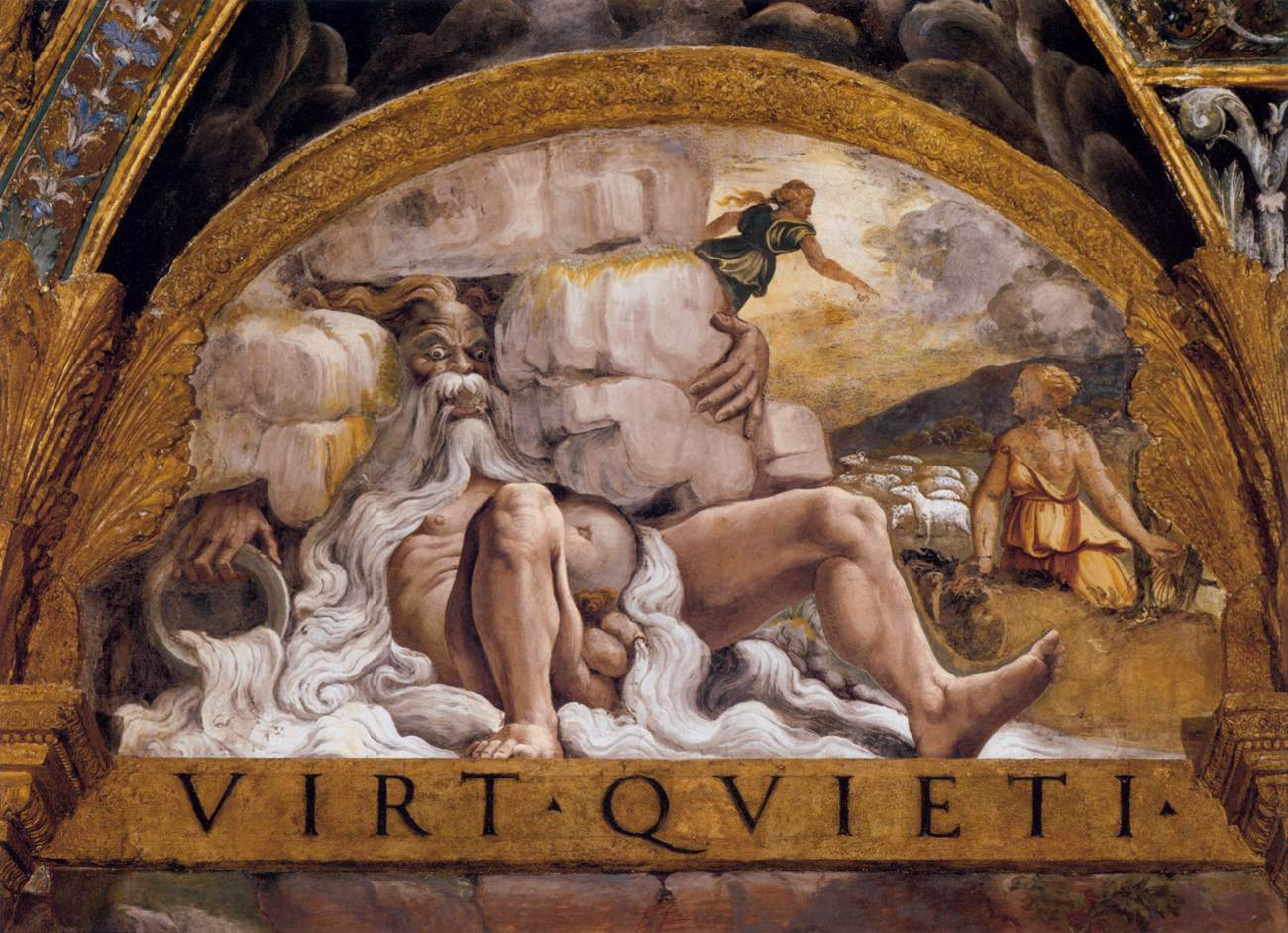 (River Deity)